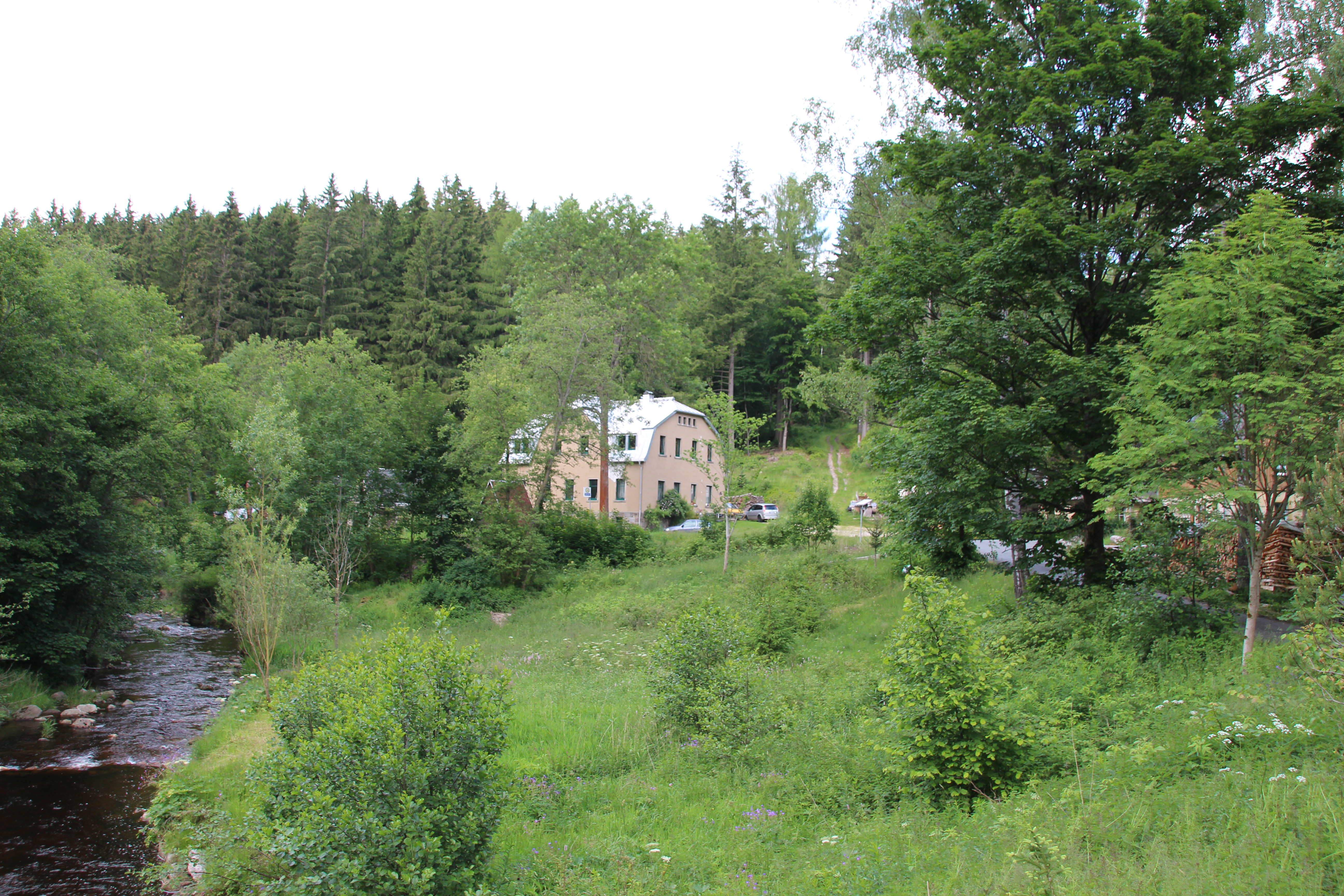 Wilzsch: Fluss und Tal bei Neues Wiesenhaus, einer Siedlung an der Wilzsch oberhalb von Wilzschhaus. Das große Gebäude war früher eine Gastwirtschaft.